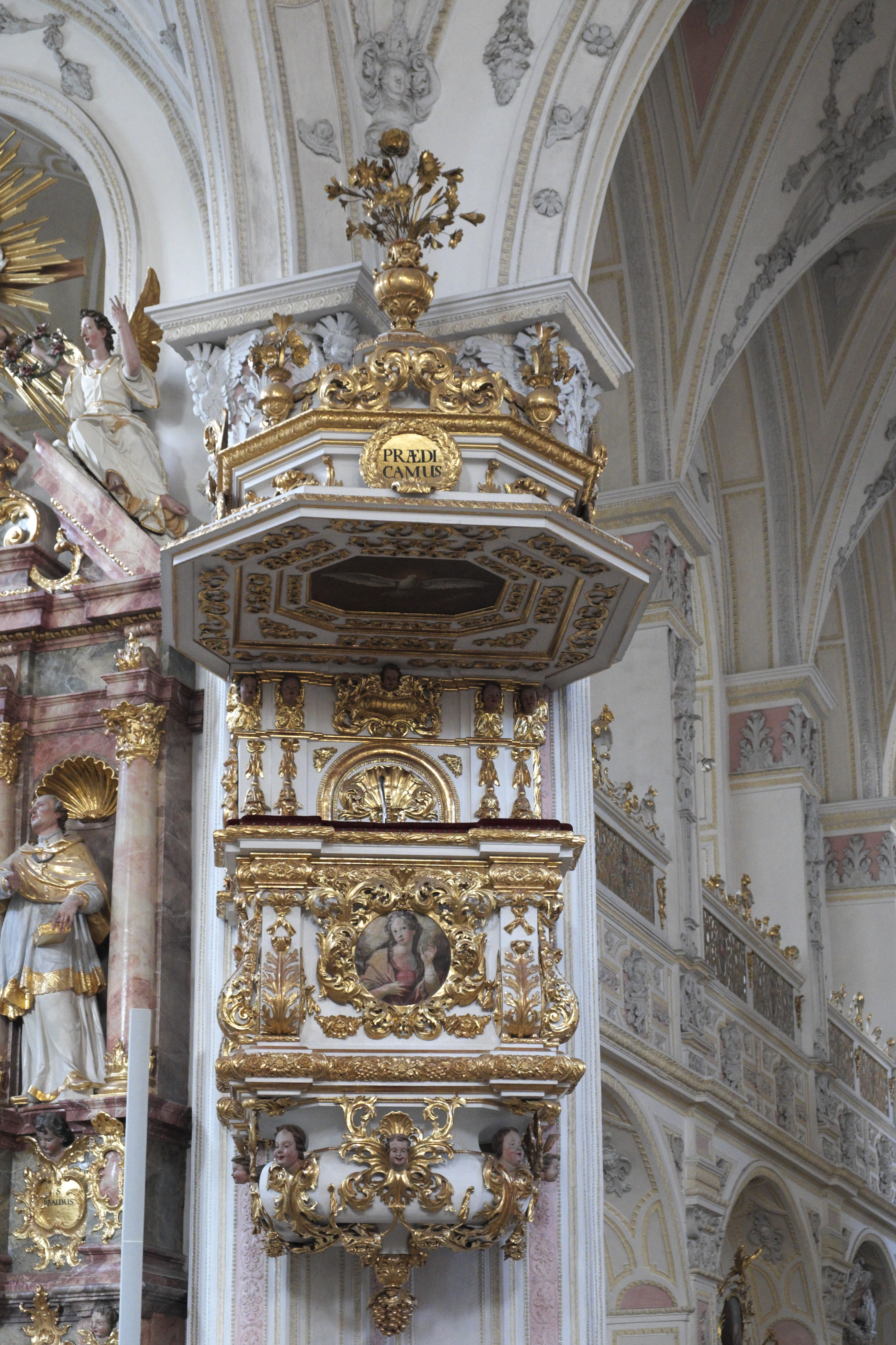 Kirche Heilig Kreuz des ehemaligen Augustinerchorherrenstifts in Polling im Landkreis Weilheim-Schongau (Bayern/Deutschland), Kanzel von 1705